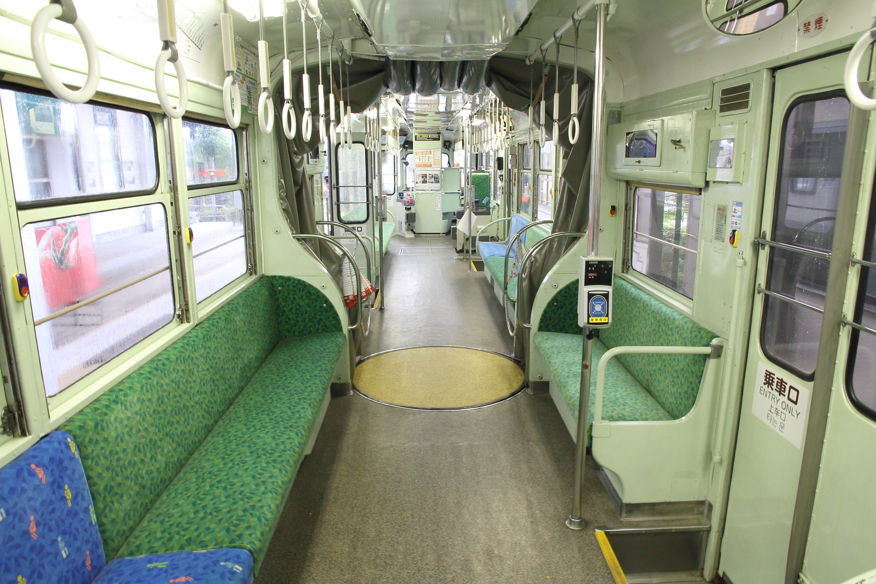 熊本市交通局5000形5014の車内。A車中央からB車に向かって撮影。